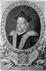 Michele Mercati von Petrus Nellus, Kupferstich (aus der Metallotheca), Privatbesitz